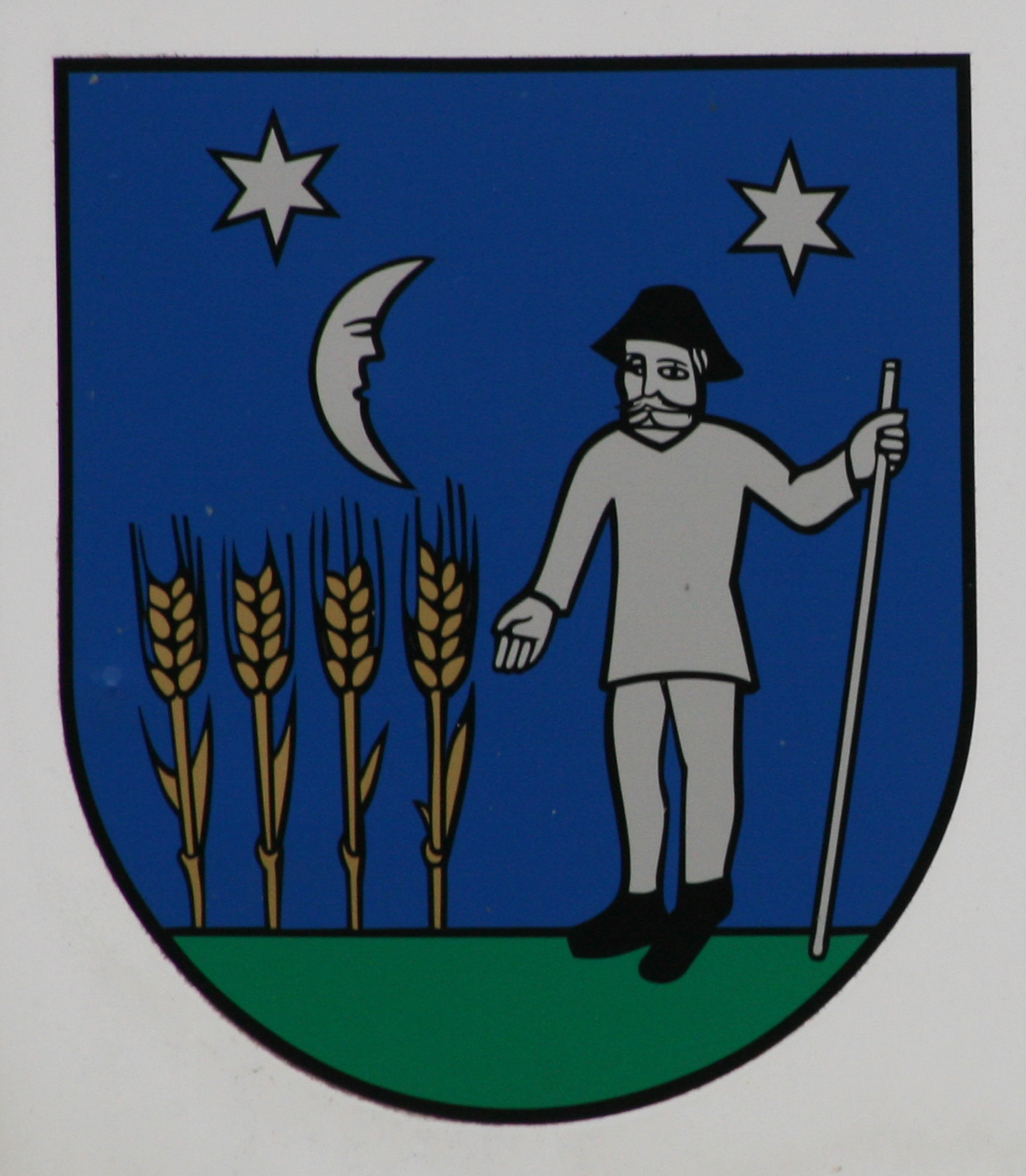 Erb obce Radoma